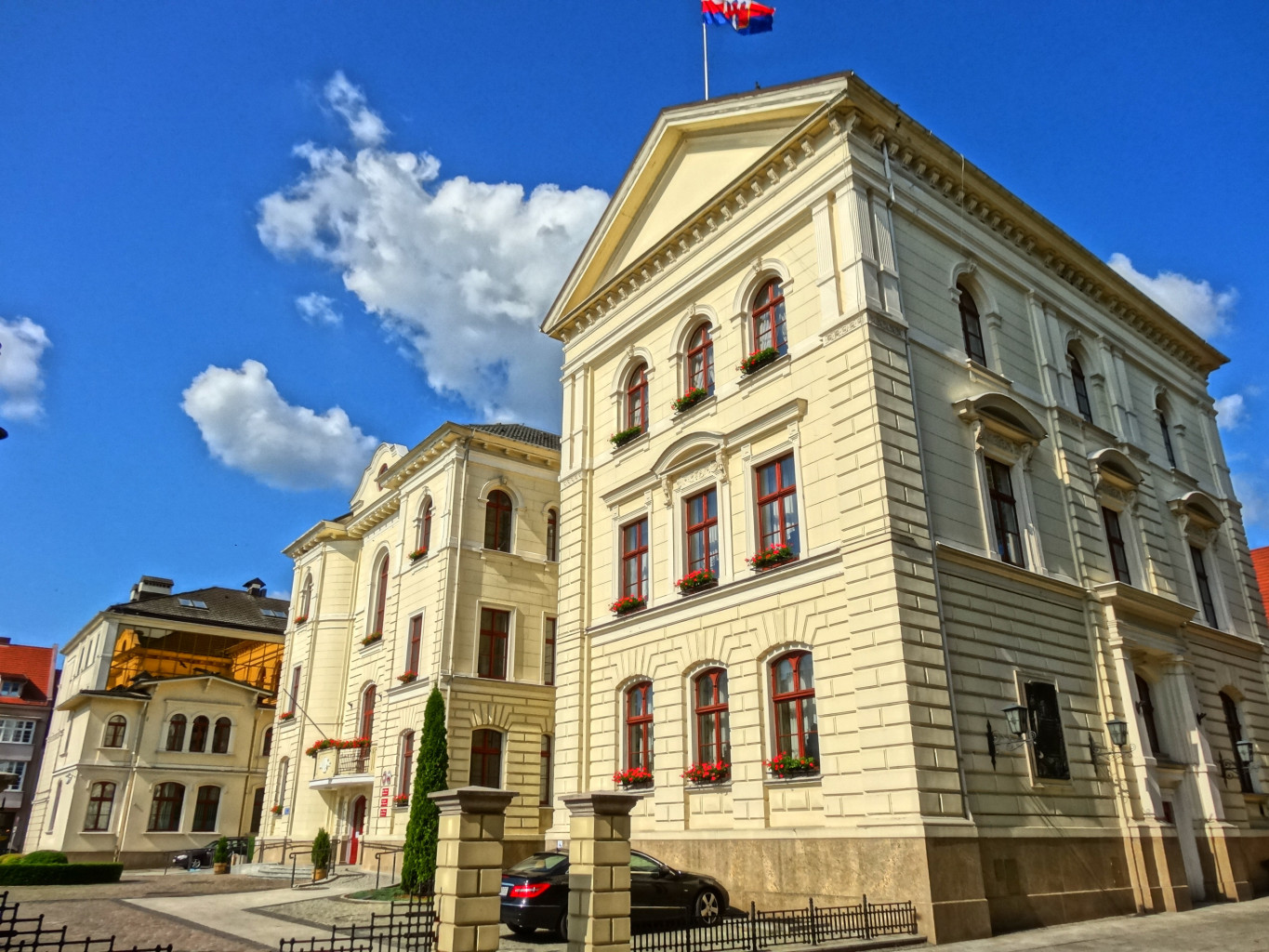 Ratusz w Bydgoszczy przy ul. Jezuickiej/Starym Rynku, dawne Kolegium Jezuickie (XVII w.)